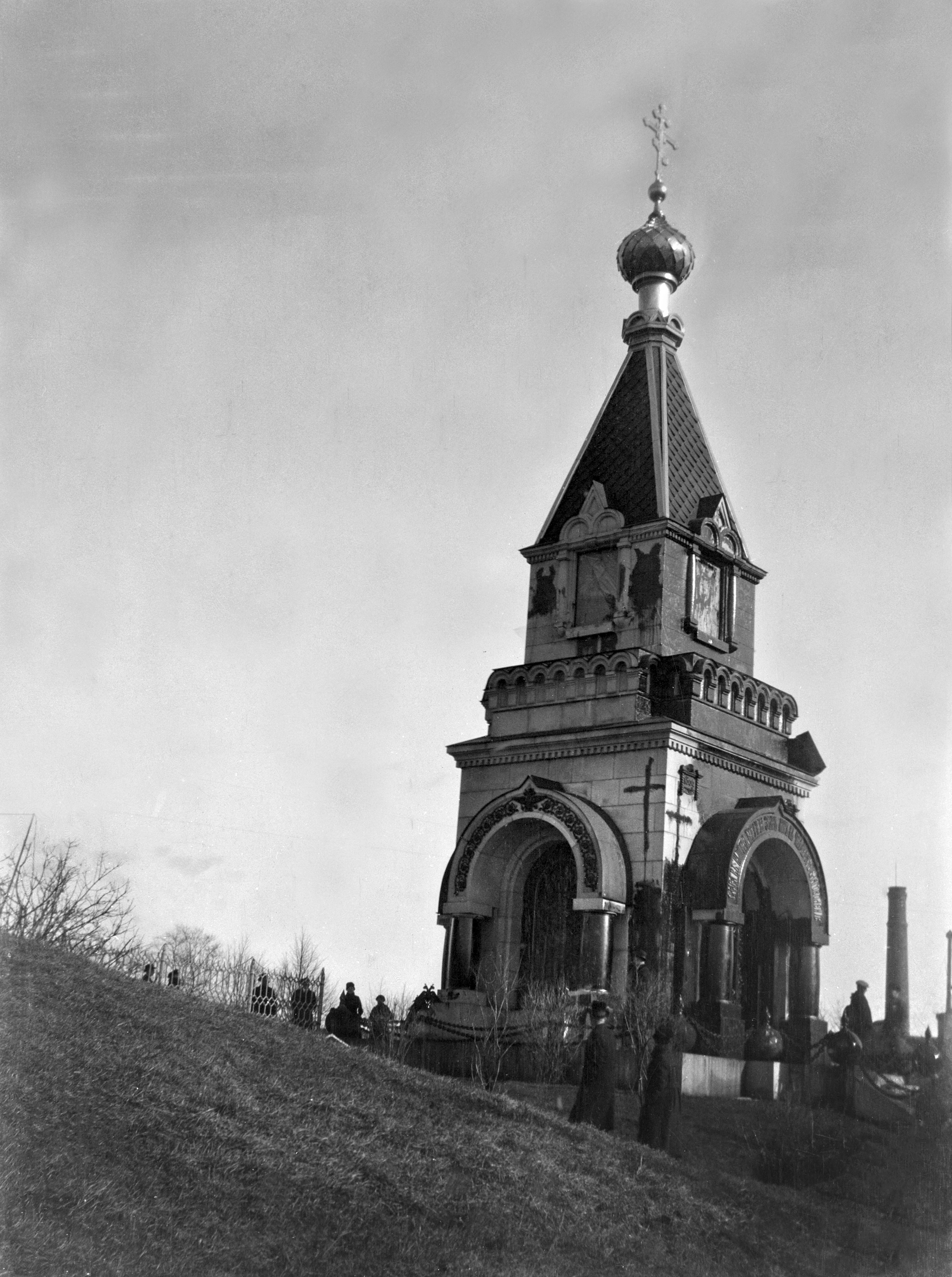 Resvoyn Rauhan kappeli Uspenskin katedraalin edustalla. Rauhankappeli on purettu vuonna 1920.